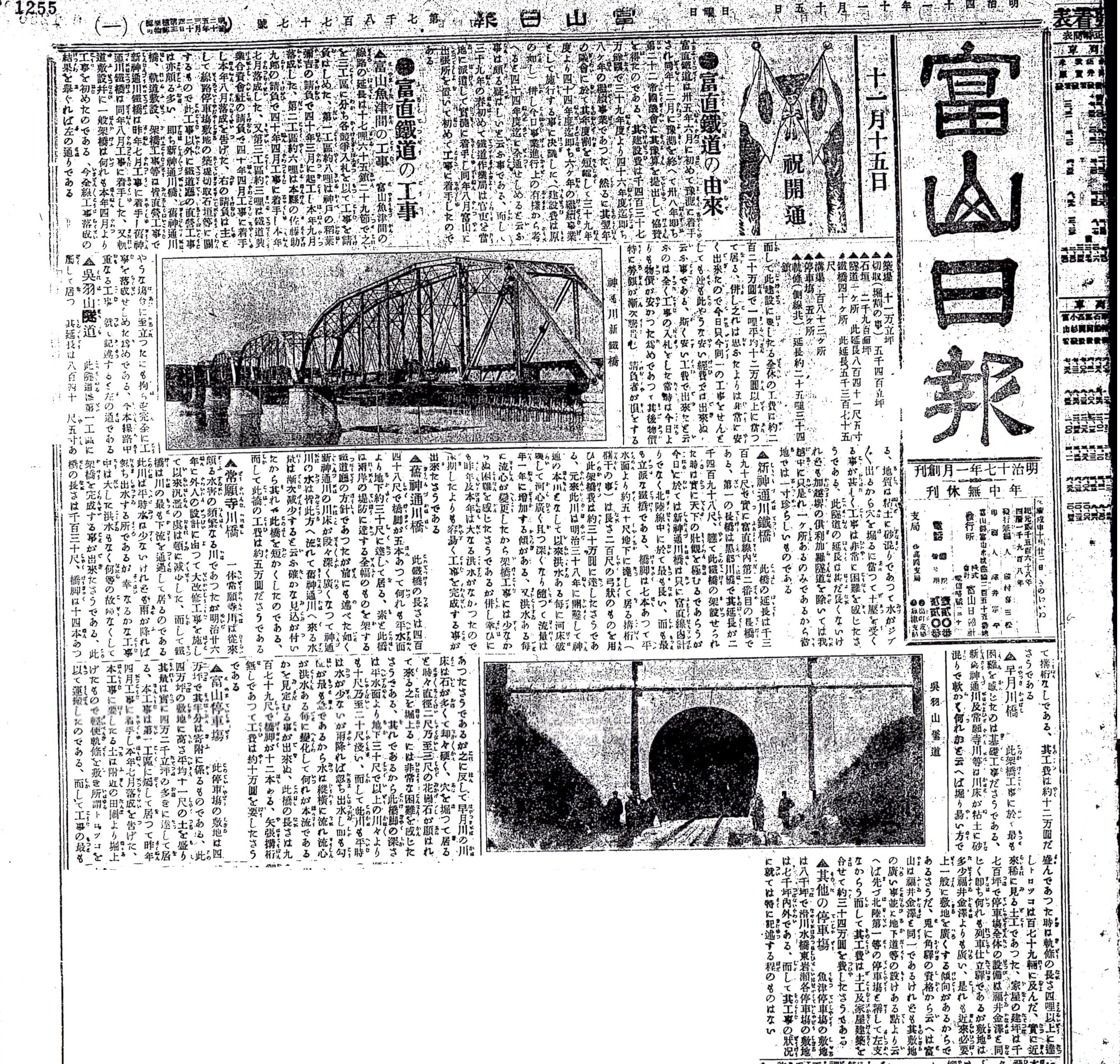 北陸本線富山駅 - 魚津駅間開通に際する新聞